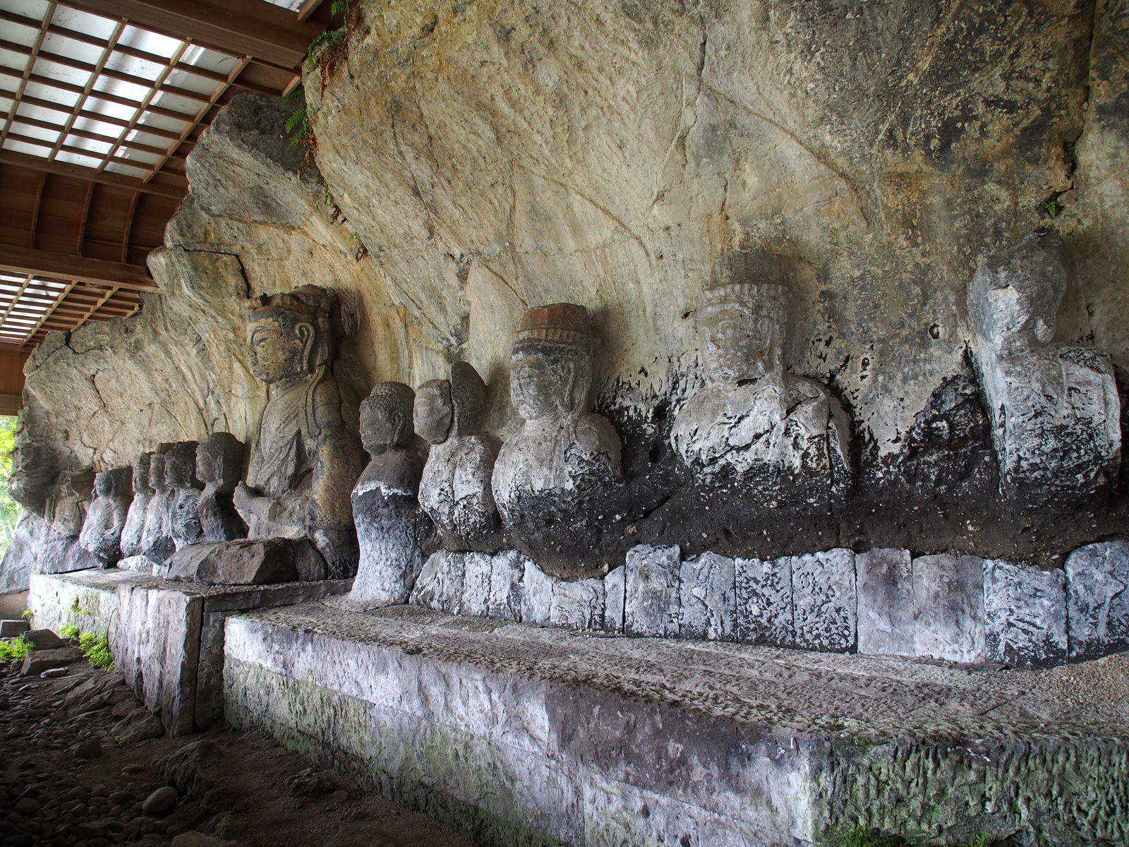 臼杵磨崖仏古園石仏群（大分県臼杵市）